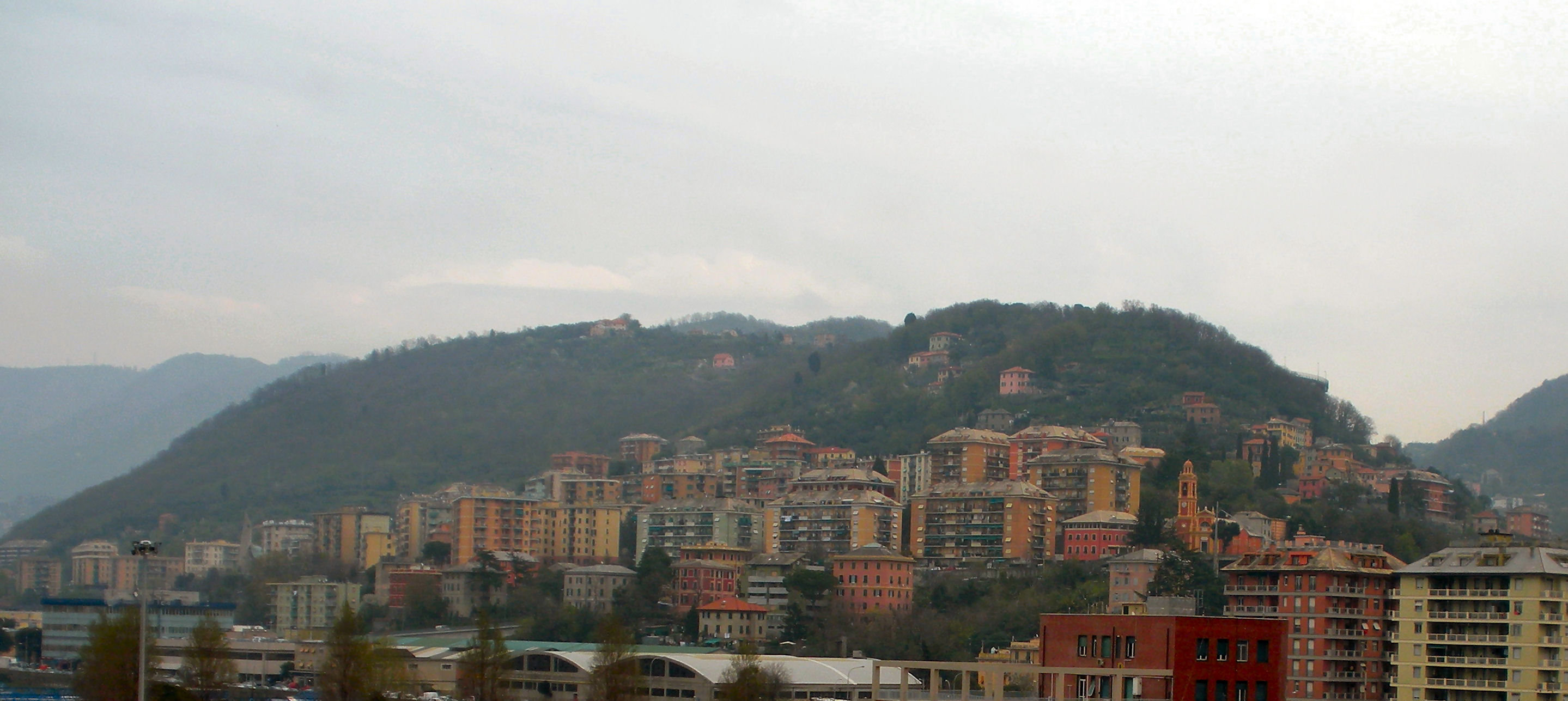 Panorama di Montesignano (Molassana, quartiere di Genova)